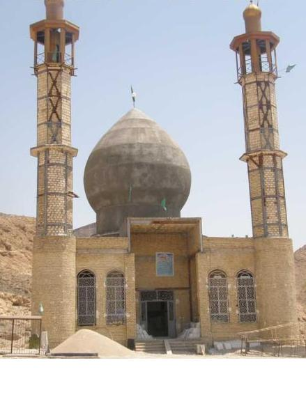 تصویر امامزاده شاع علمدار در سال 1392